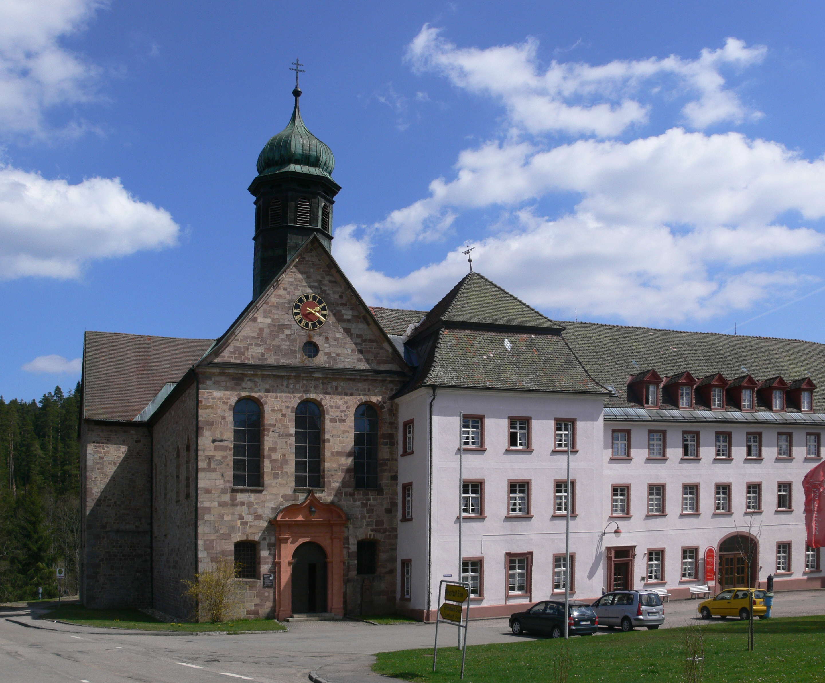 Friedenweiler, ehem. Klosterkirche (heute Pfarrkirche St. Johann Baptist)